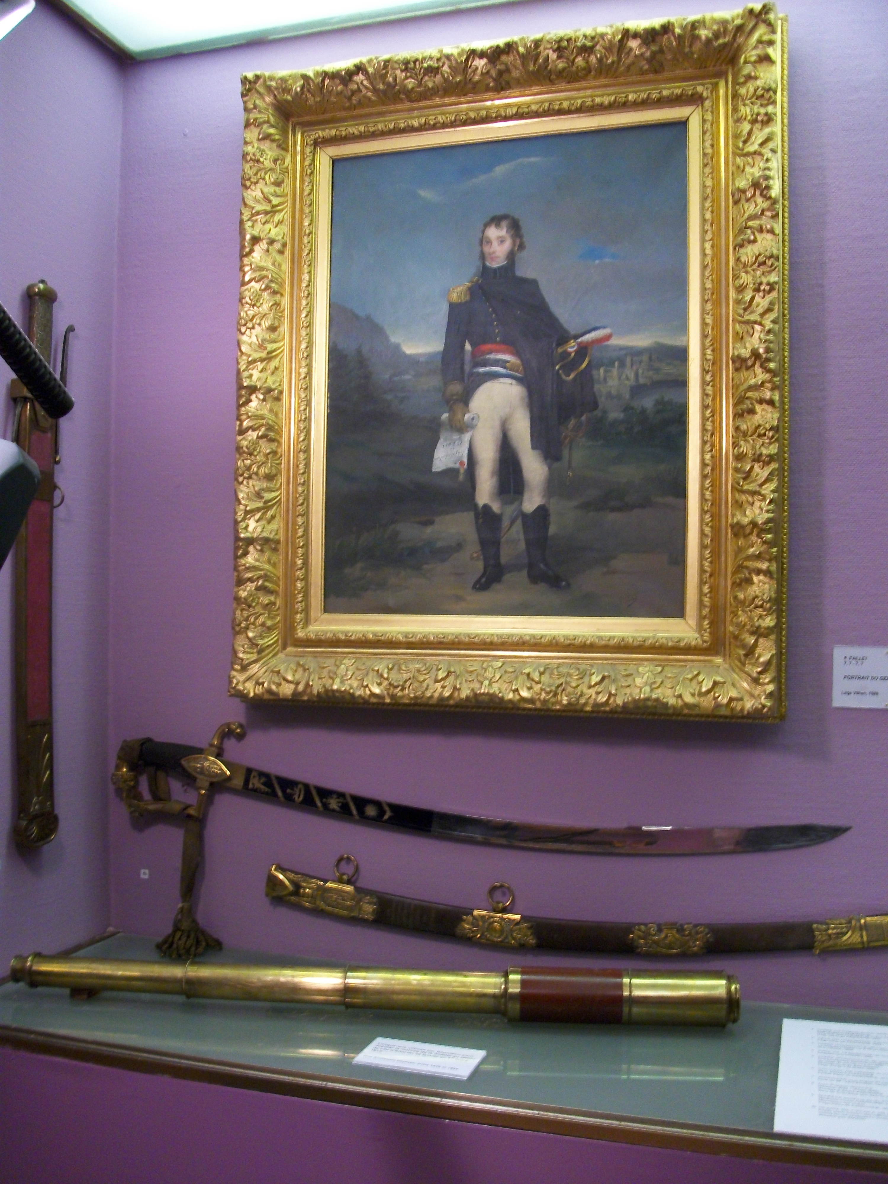 La longue-vue utilisé par Napoleon Ier à son retour de l'île d'Elbe dans la vitrine consacrée à l'Empire au Musée des beaux-arts de Carcassonne.